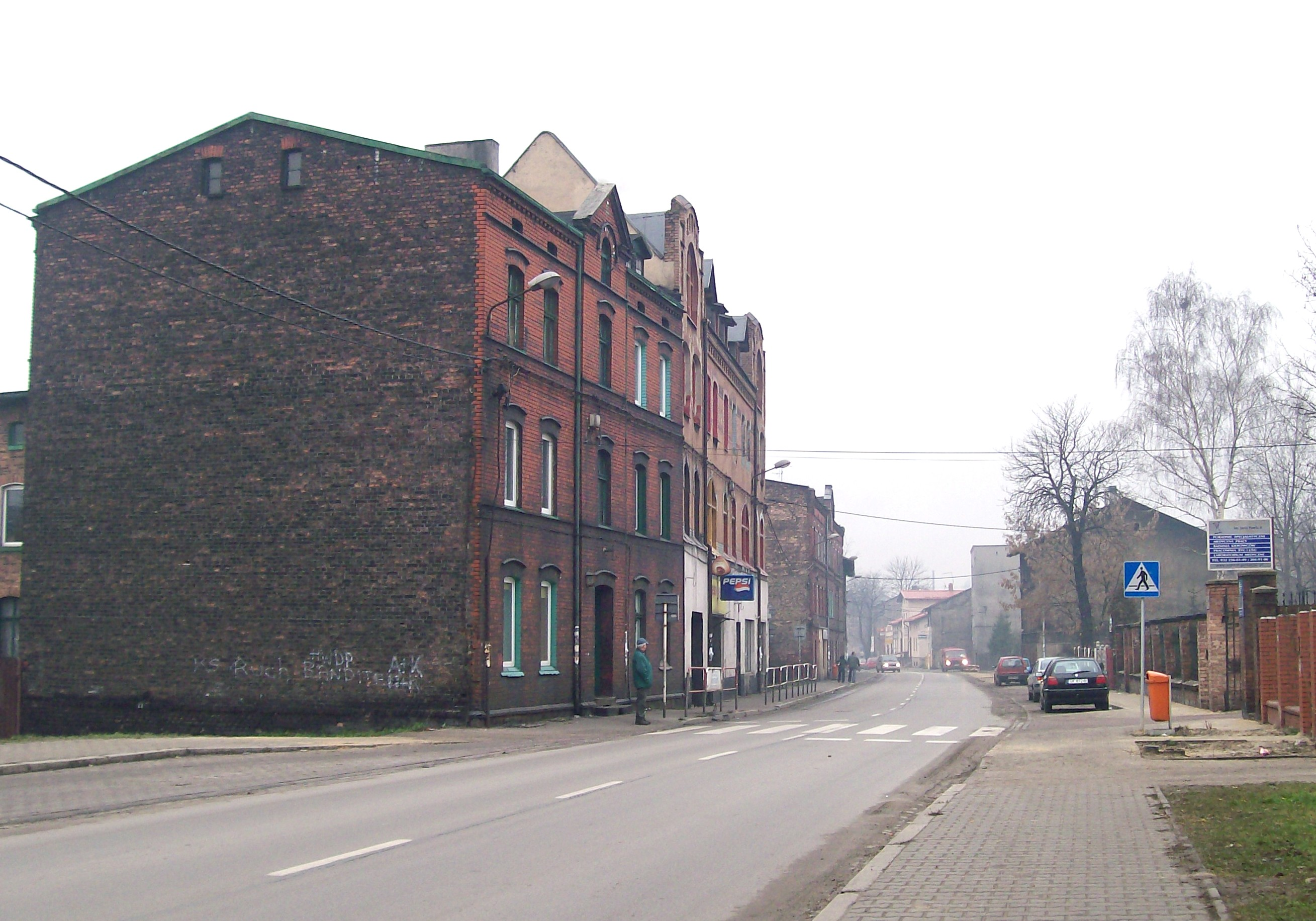 Ulica Morawy w Katowicach-Szopienicach.